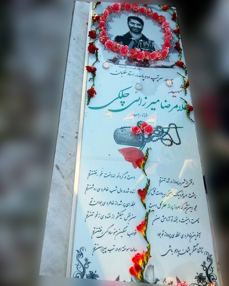 آرامگاه خلبان غلامرضا میرزایی